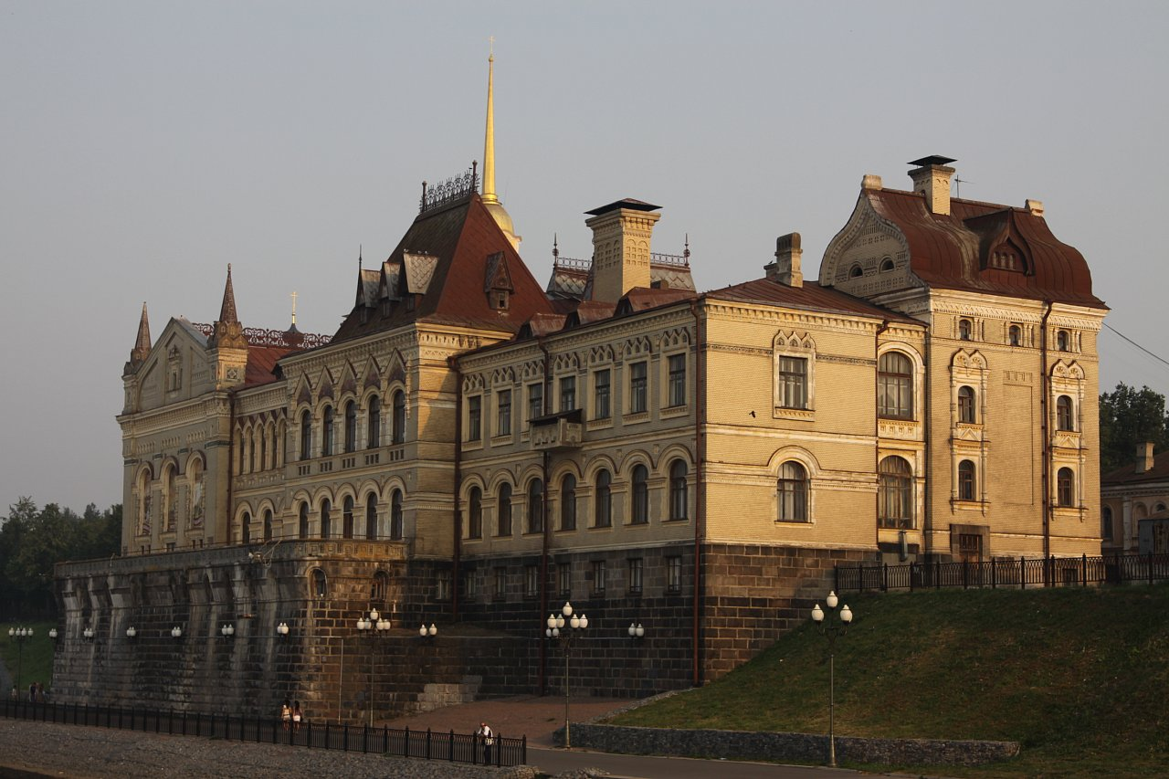 Рыбинский историко-художественный и архитектурный музей (музейный комплекс) (Ярославская область, Рыбинск, город Рыбинск)